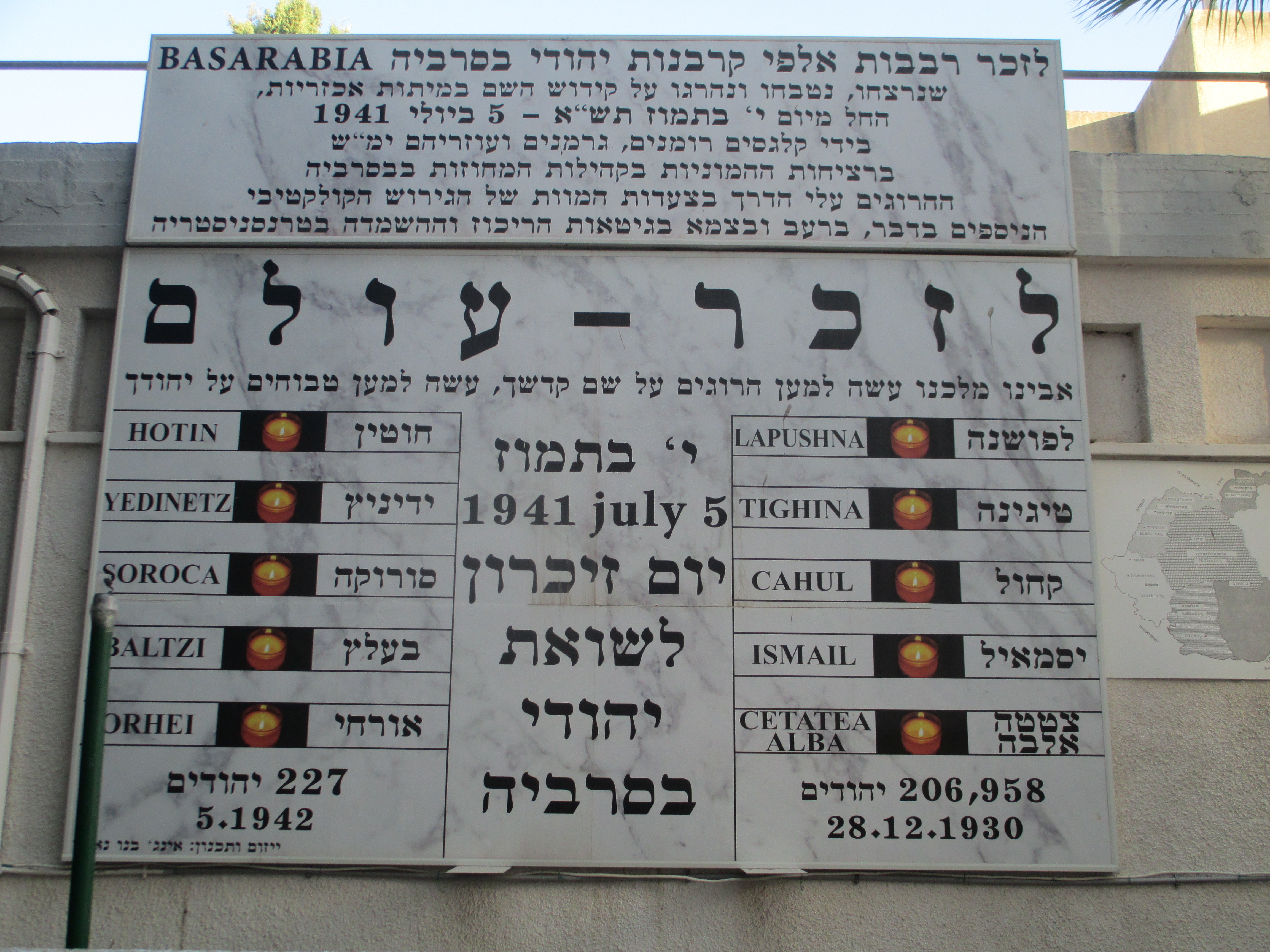 לוח זיכרון ליהודי בסרביה שנספו בשואה - בבית הכנסת בית יעקב יוסף - הרב צבי גוטמן ברחוב פקיעין 12א בתל אביב